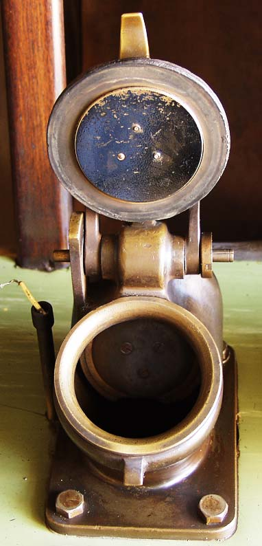 Vstup trasy pražské potrubní pošty Hornjoserbsce: Tutón wobraz pokazuje zastup trasow Praskeho rołoweho pósta